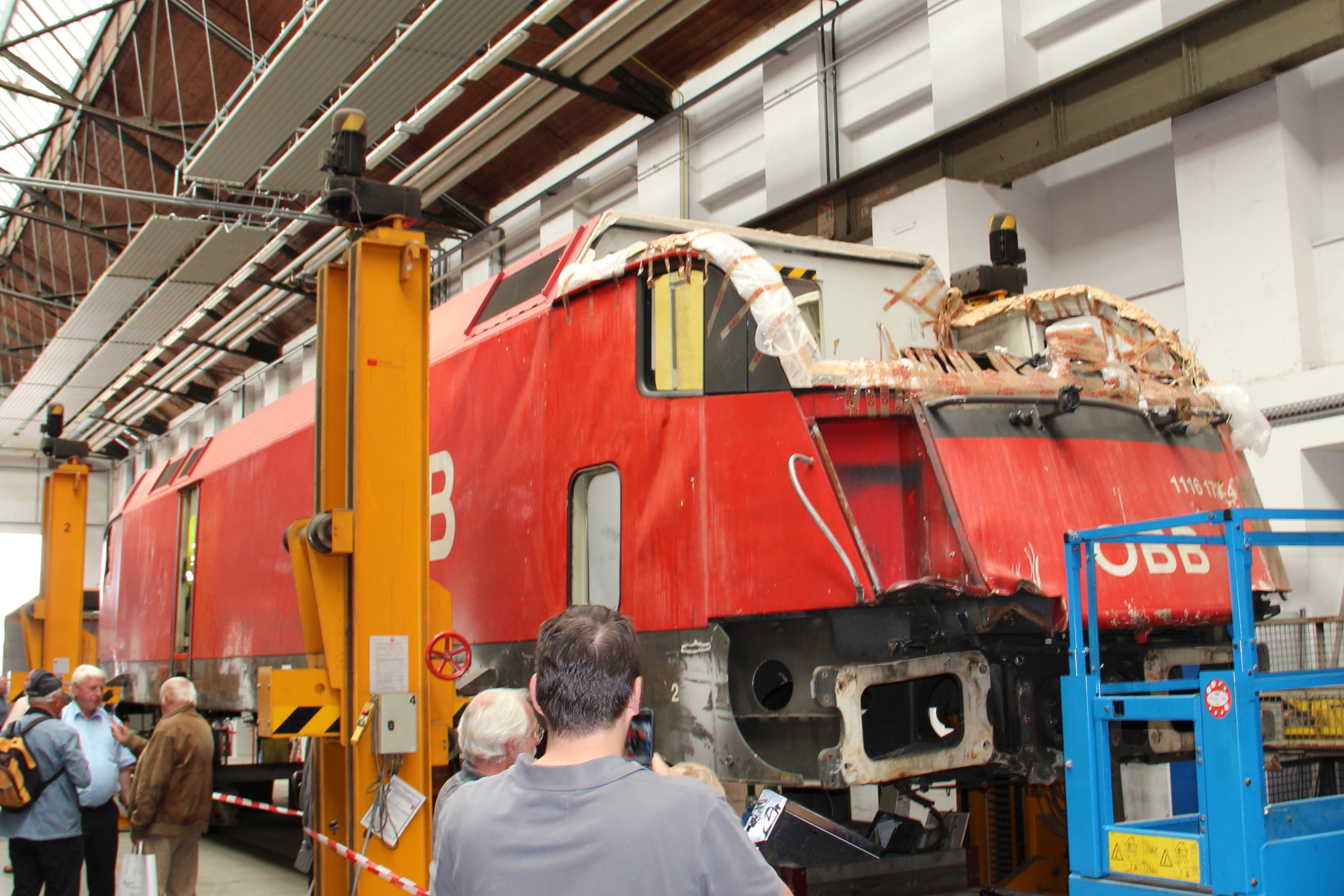 Der Lokkasten der in Braz schwer verunfallten 1116.173 während der Begutachtung des Schadens in der HW Linz.